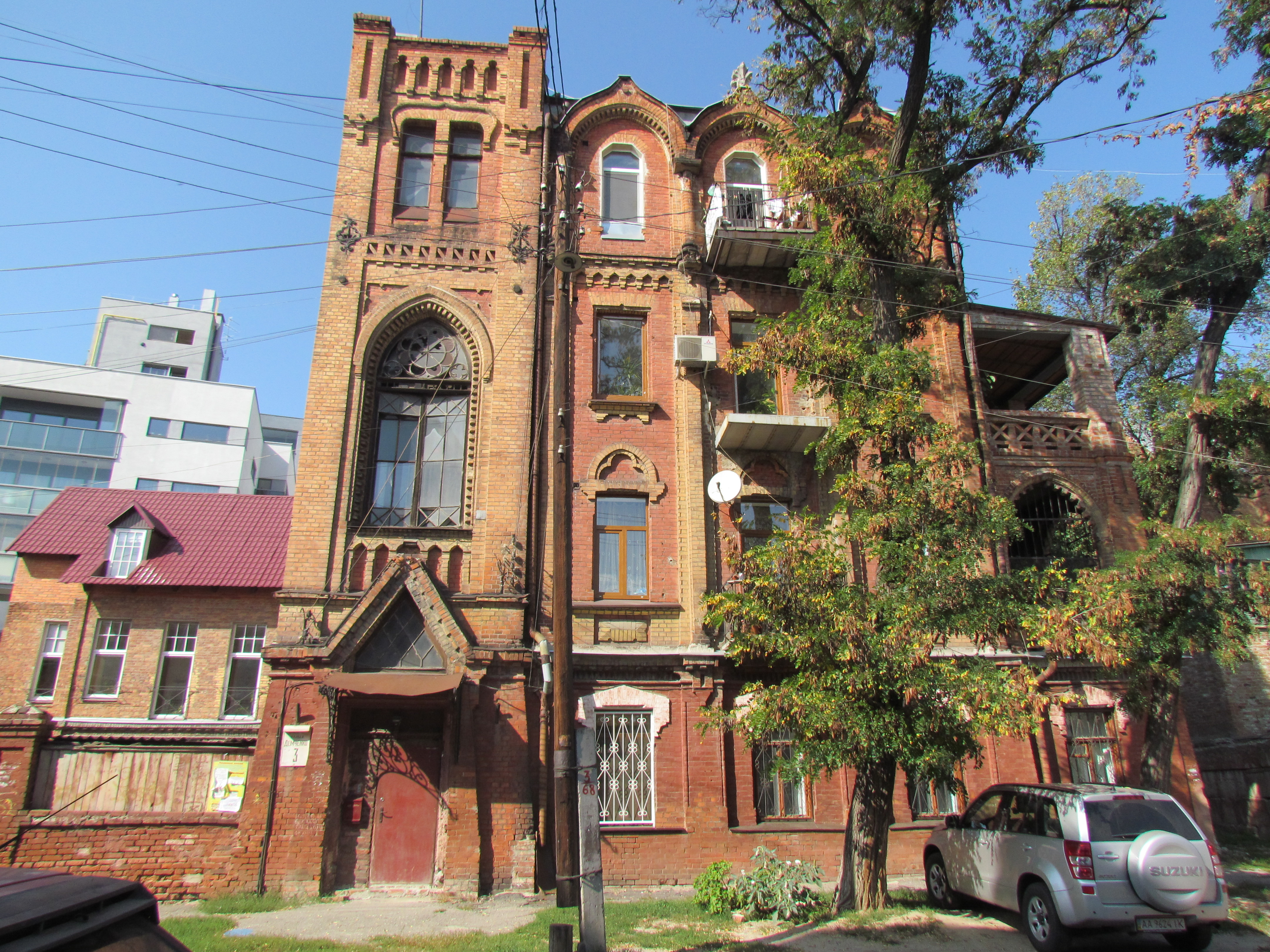 Україна, Харків, будинок, вул. Демченка, 3